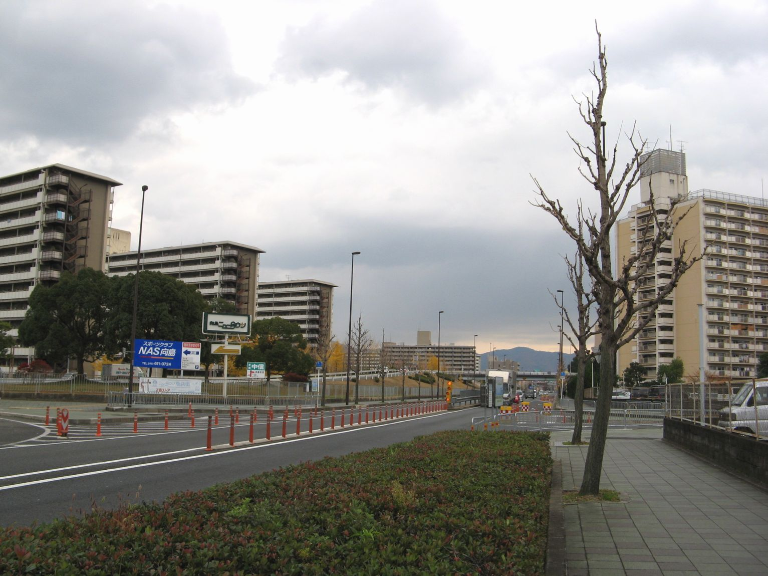 向島ニュータウン 伏見区向島丸町付近 国道24号を南東望